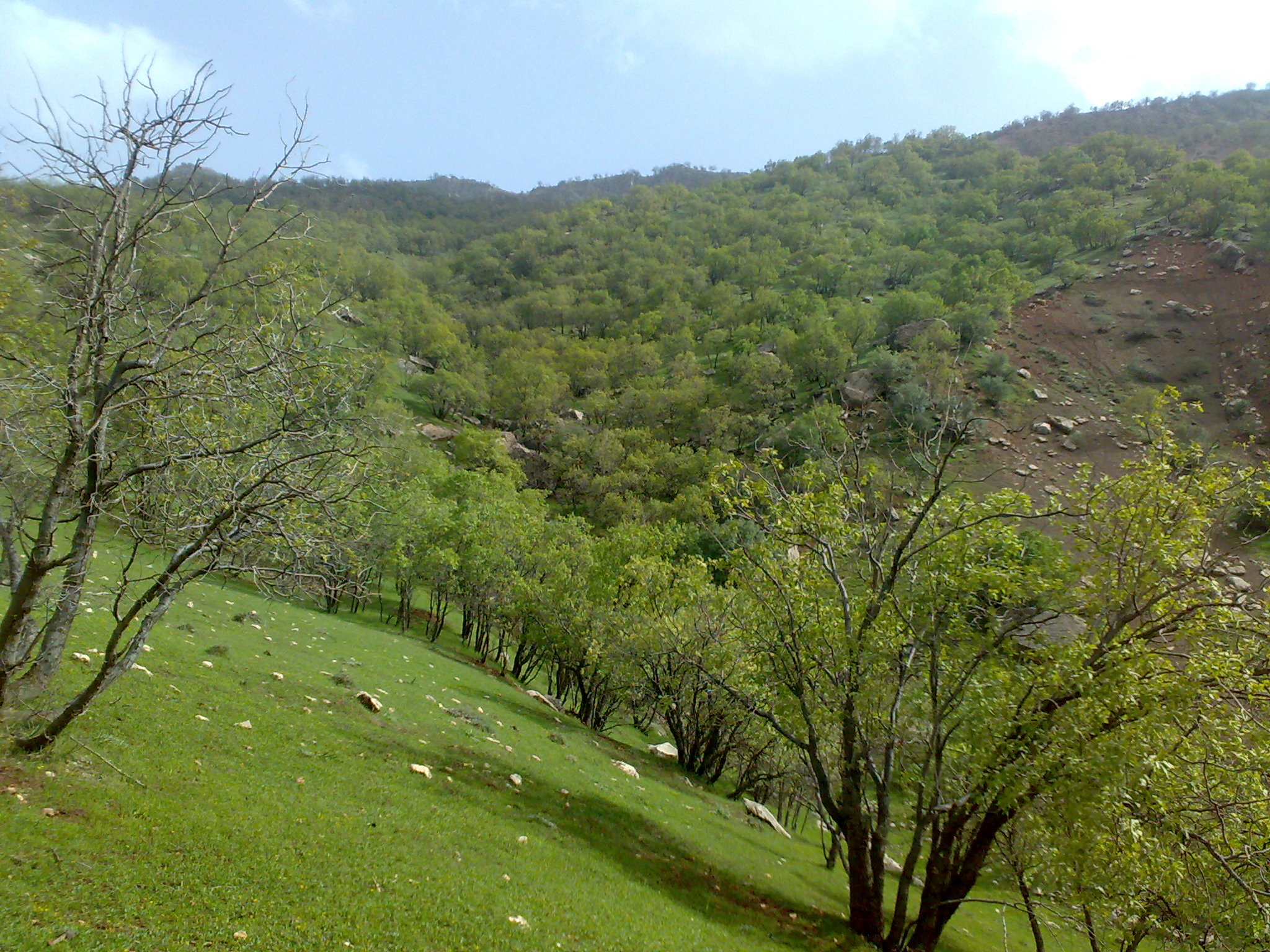 درختان انبوه بلوط منطقه دره نی روستای سرفراش از توابع بخش معمولان شهرستان پلدختر.